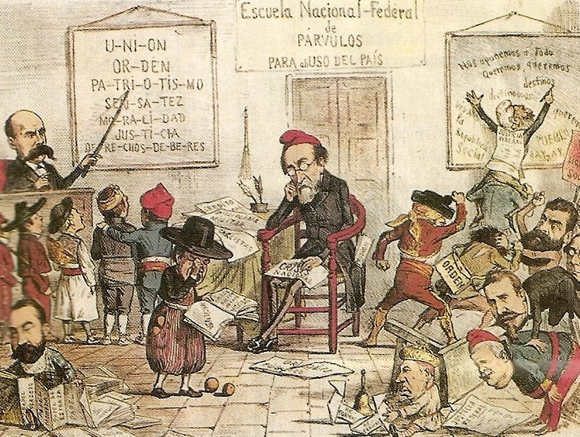 Caricatura de la República publicada en La Flaca en 1873. Pi i Margall se ve desbordado por el federalismo, representado en figuras infantiles ataviadas con los distintos trajes regionales, mientras Castelar intenta poner orden instruyendo a los alumnos.